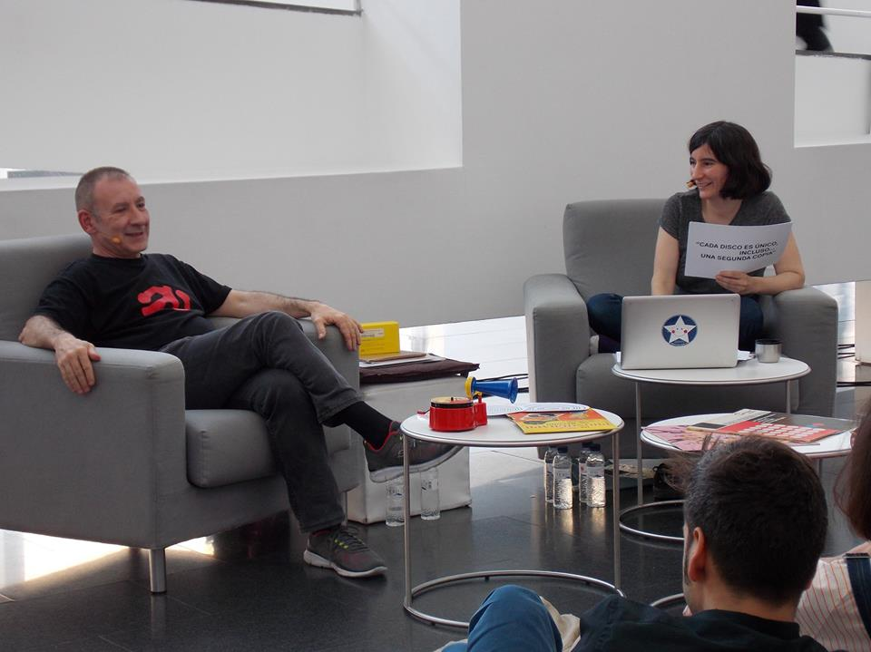 Amb motiu del desè aniversari de Ràdio Web MACBA, vam conversar amb el músic Anki Toner sobre la seva col·lecció d'objectes gramofònics, formada per discos de diverses mides i suports. Amb ell, vam reflexionar sobre l’alta i la baixa fidelitat, l’arxiu musical i les transformacions del mercat discogràfic. Foto: Carmen Milla, 2016.